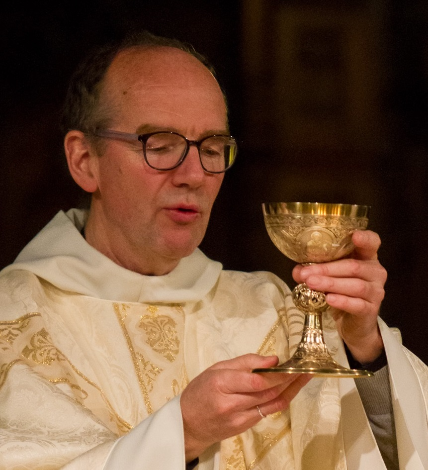 Le Père Philippe Christory célèbre l'eucharistie du Jeudi Saint 2014